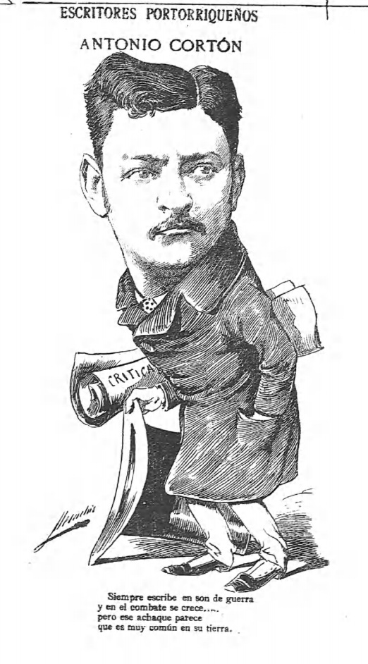 Caricatura de Antonio Cortón (escritor portorriqueño), por «Mecachis»